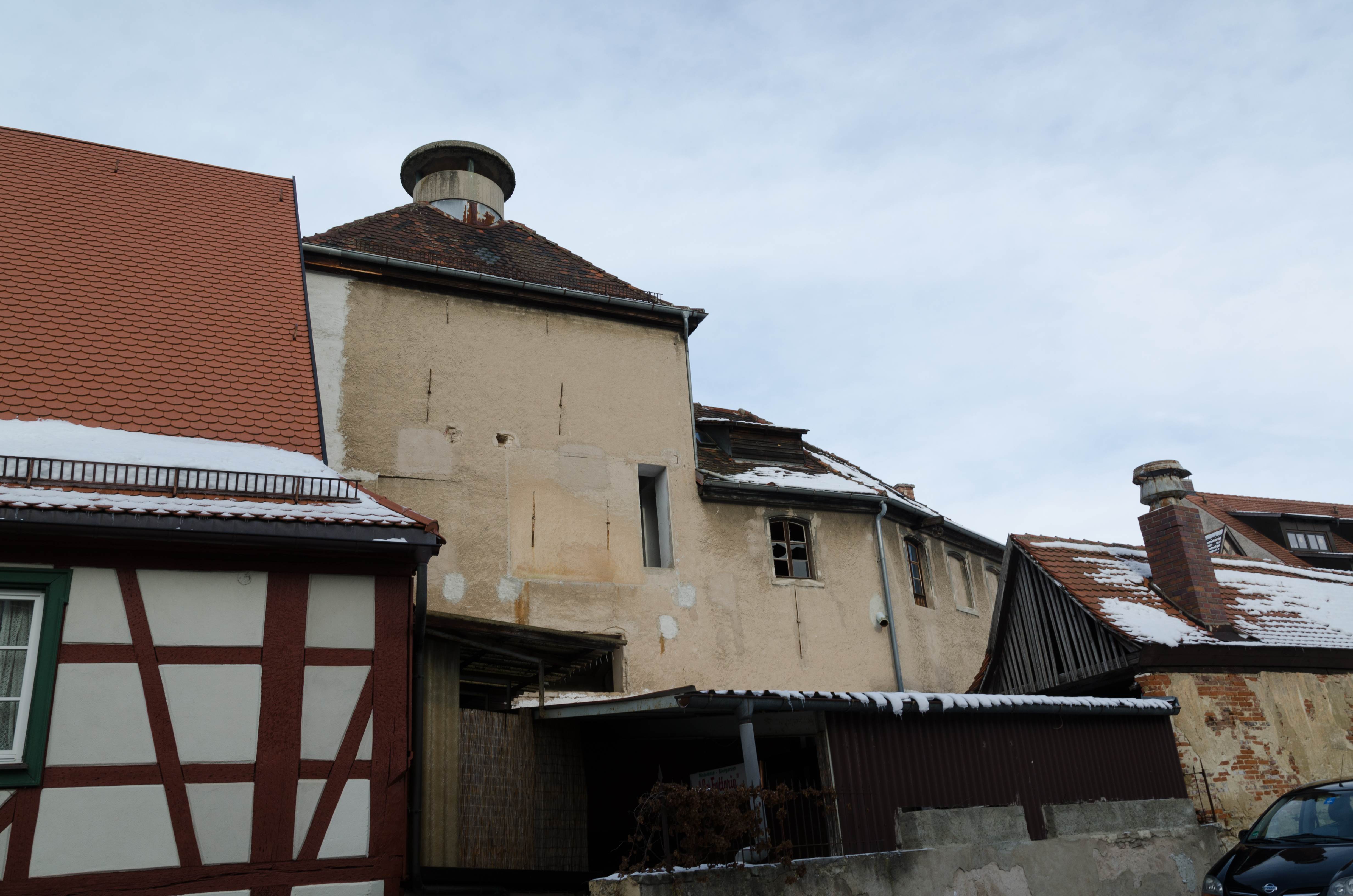 Weißenburg, Frauentorstraße 11, Nebengebäude